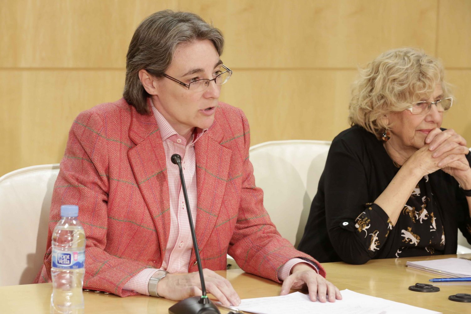 El Ayuntamiento de Madrid ha anunciado hoy la creación del Área de Gobierno de Igualdad, competencia que hasta ahora formaba parte del Área que encabeza la primera teniente alcalde, Marta Higueras, y que incluía además Derechos Sociales y Empleo.